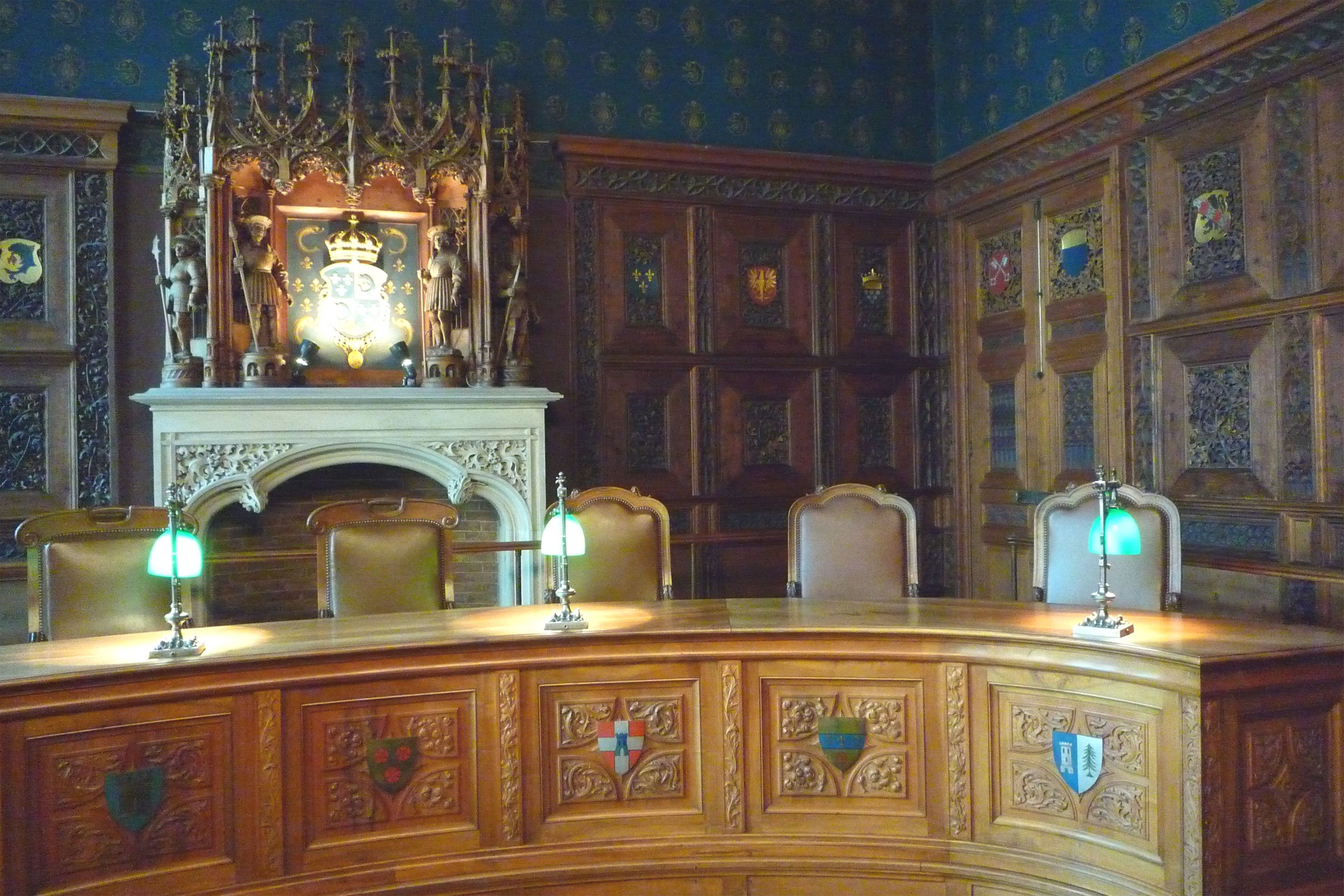 salle parlement du Dauphiné - Grenoble Blasons : en bas de gauche à droite : ? Grenoble ? ressemble un peu à Saint-Marcellin avec couleurs inversées ? La Tour-du-Pin